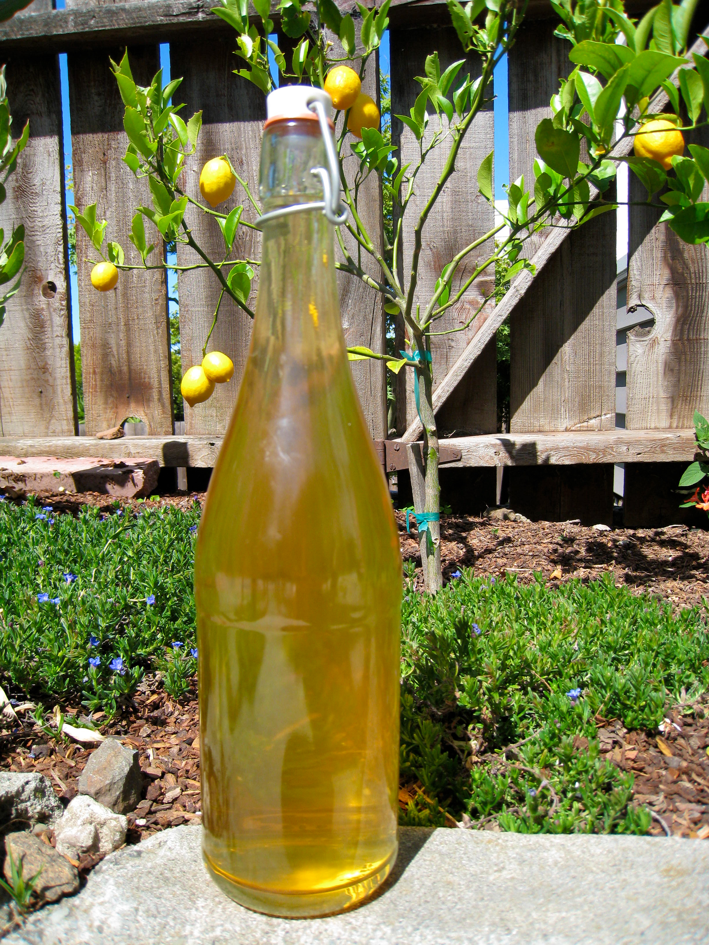 Limoncello